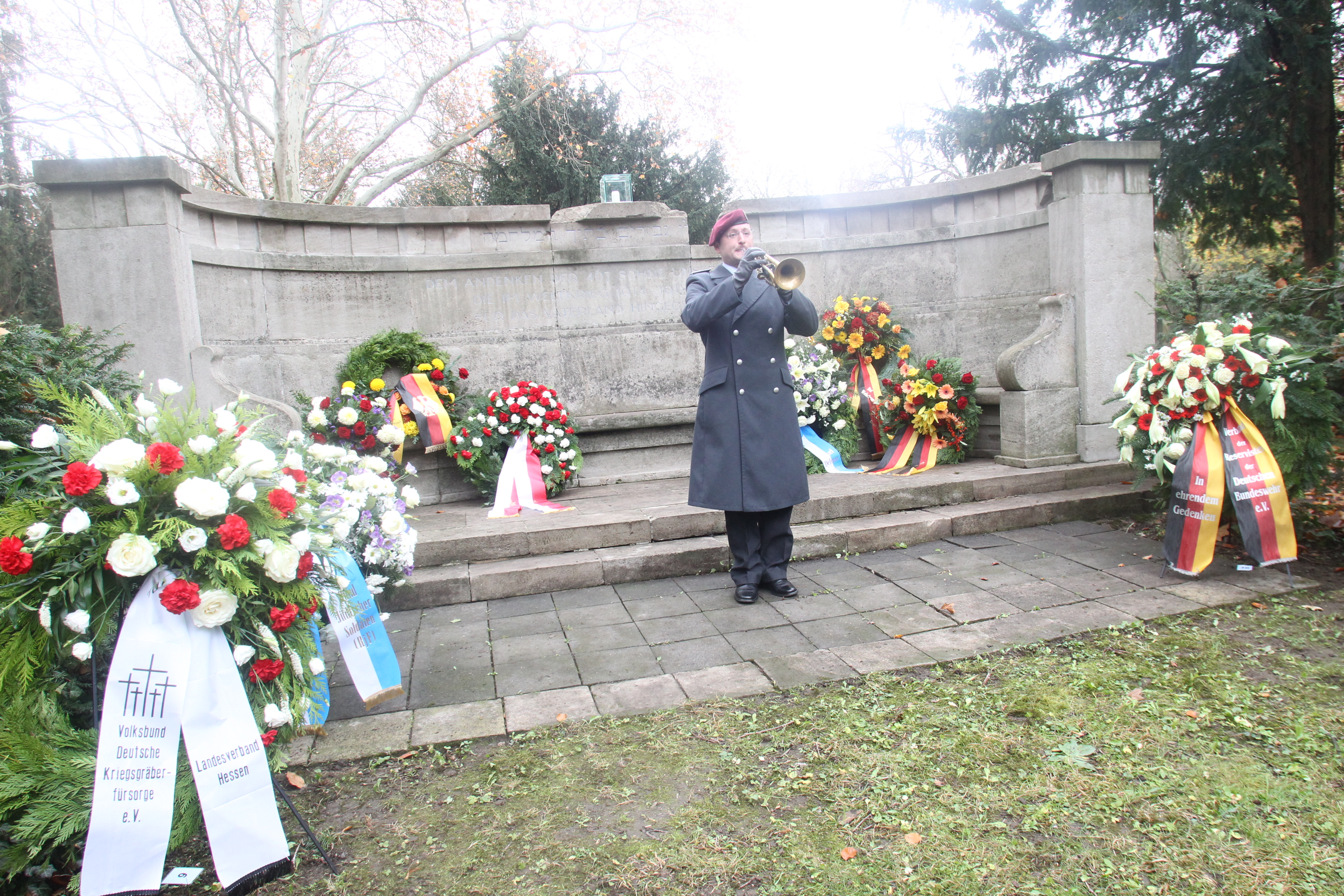 Ehrung der gefallenen jüdischen Soldaten und der Opfer der Shoa unter Beteiligung Zentralrat der Juden in Deutschland, Jüdische Gemeinde Frankfurt am Main, US Army, israelischer Verteidigungsattaché, Österreichische Streitkräfte und Bundeswehr am Ehrenmal RjF auf dem Jüdischen Friedhof Frankfurt am Main, Rat-Beil-Strasse